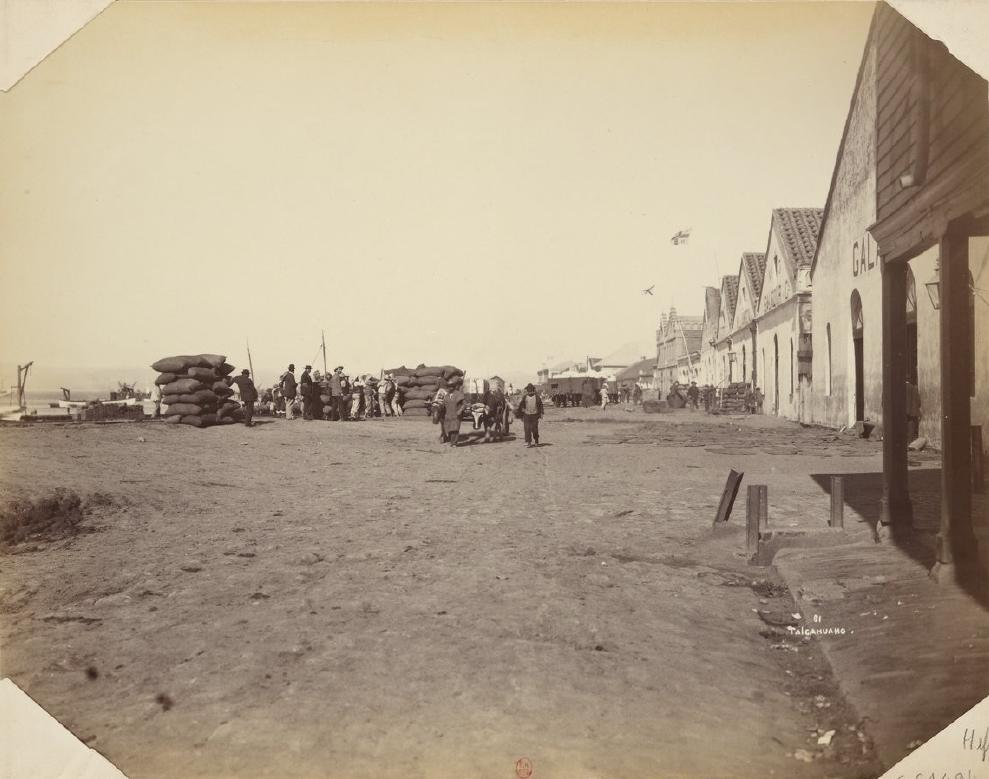 Les quais de Talcahuano.